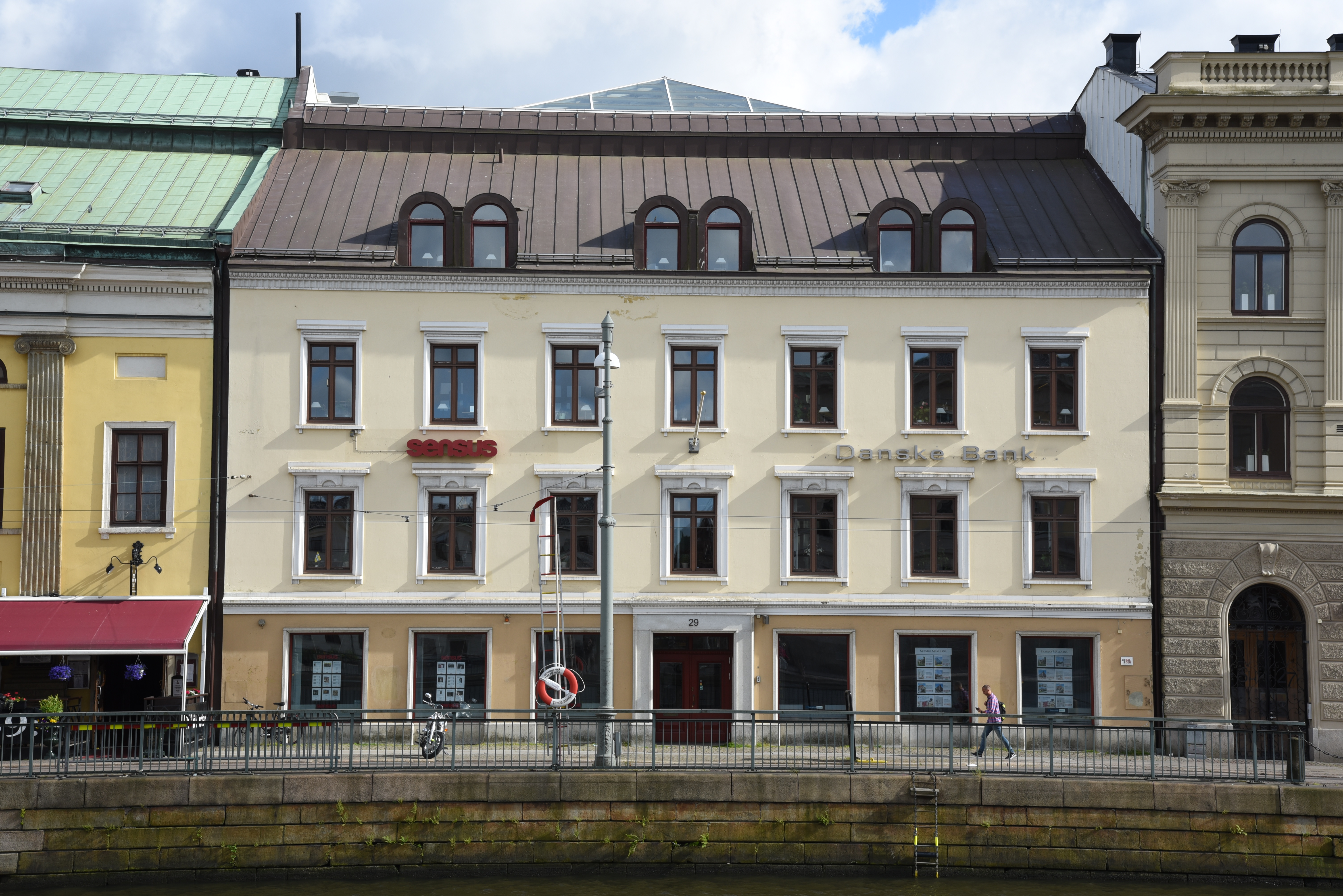 Södra Hamngatan 29 i 15 kvarteret Frimuraren i stadsdelen Inom Vallgraven i Göteborg. Huset uppfört 1980.